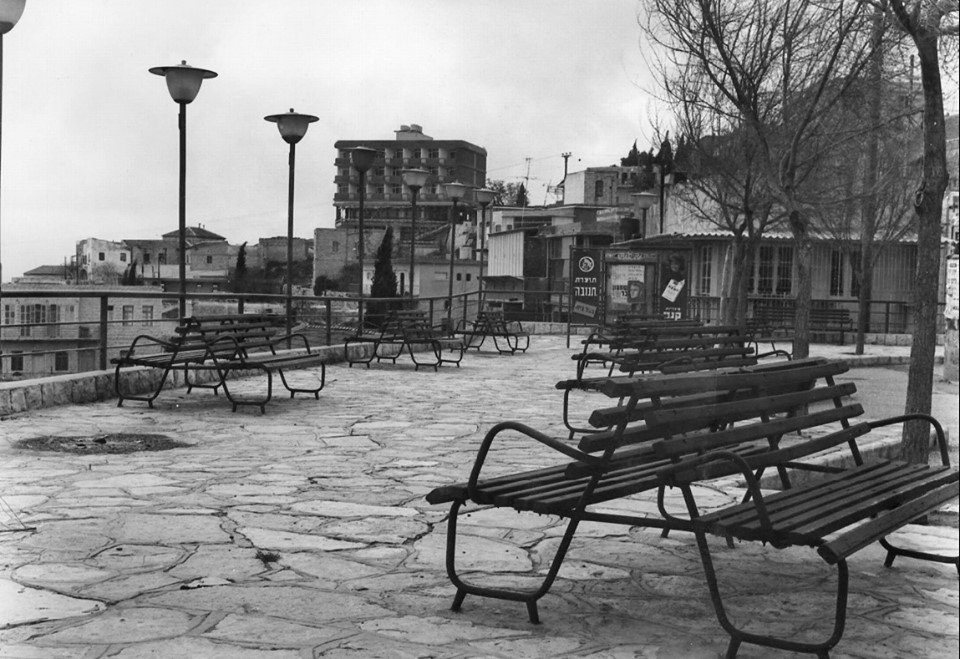 רחבת קולנוע אור בצפת, 1965